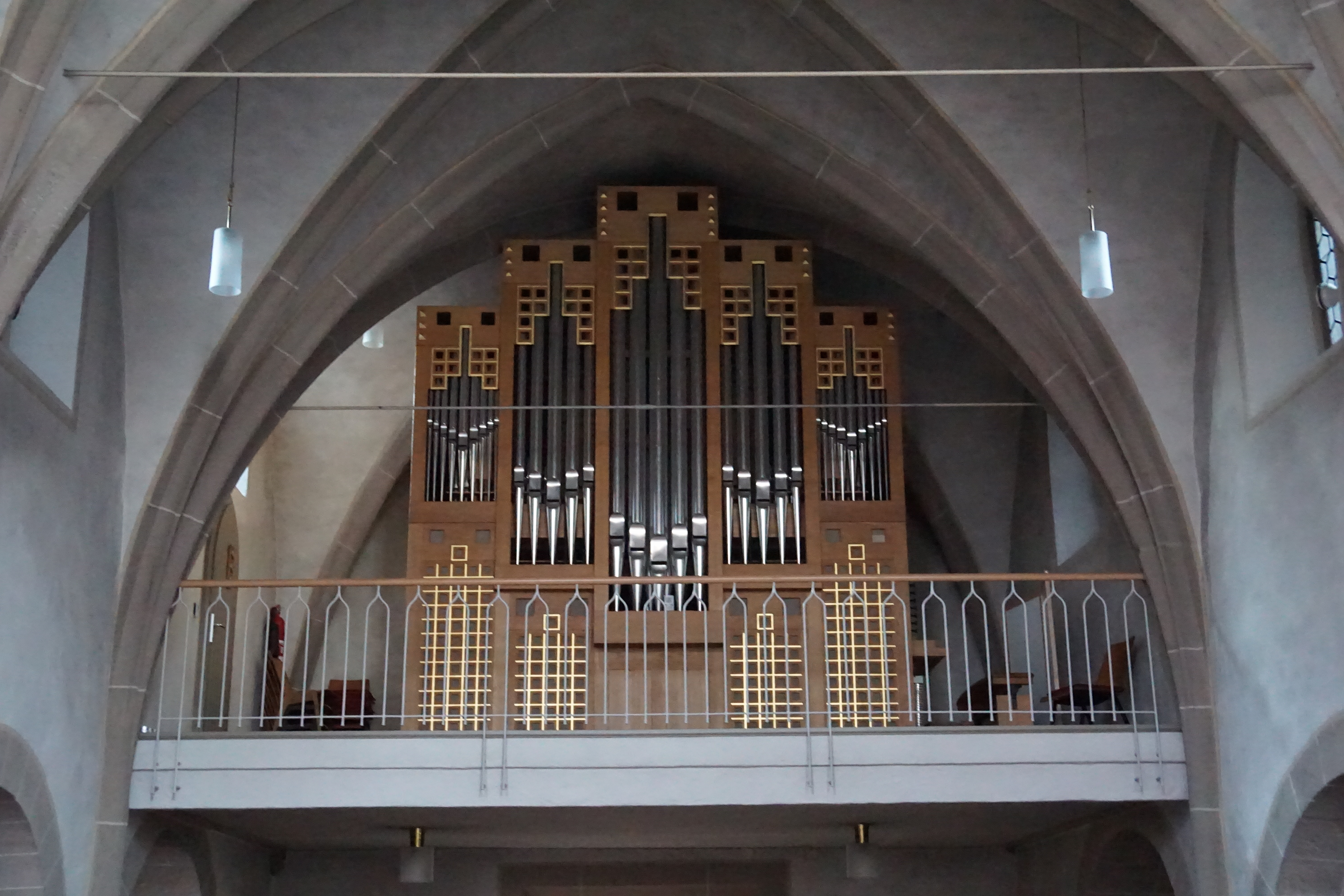 Stadtkirche Homberg (Ohm)